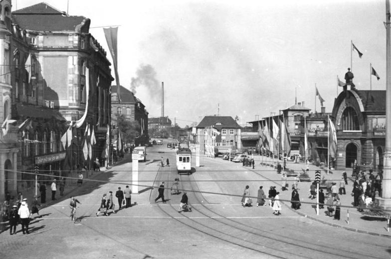 Erfurt, Hauptbahnhof, Vorplatz Zentralbild Wehse 27.5.1955 Schü.-E. Erfurter Hauptbahnhofsplatz. In den letzten Wochen sind fleissige Hände darum bemüht gewesen, unseren Bahnhofsvorplatz neu zu gestalten. In seiner jetzigen Form trägt er nicht nur zur Verschönerung des Stadtbildes bei, sondern er ist verkehrstechnisch wesentlich verbessert worden. Bild 1 Der Bahnhofsvorplatz in seiner neuen Gestaltung von der Reichsbahndirektion aus gesehen.